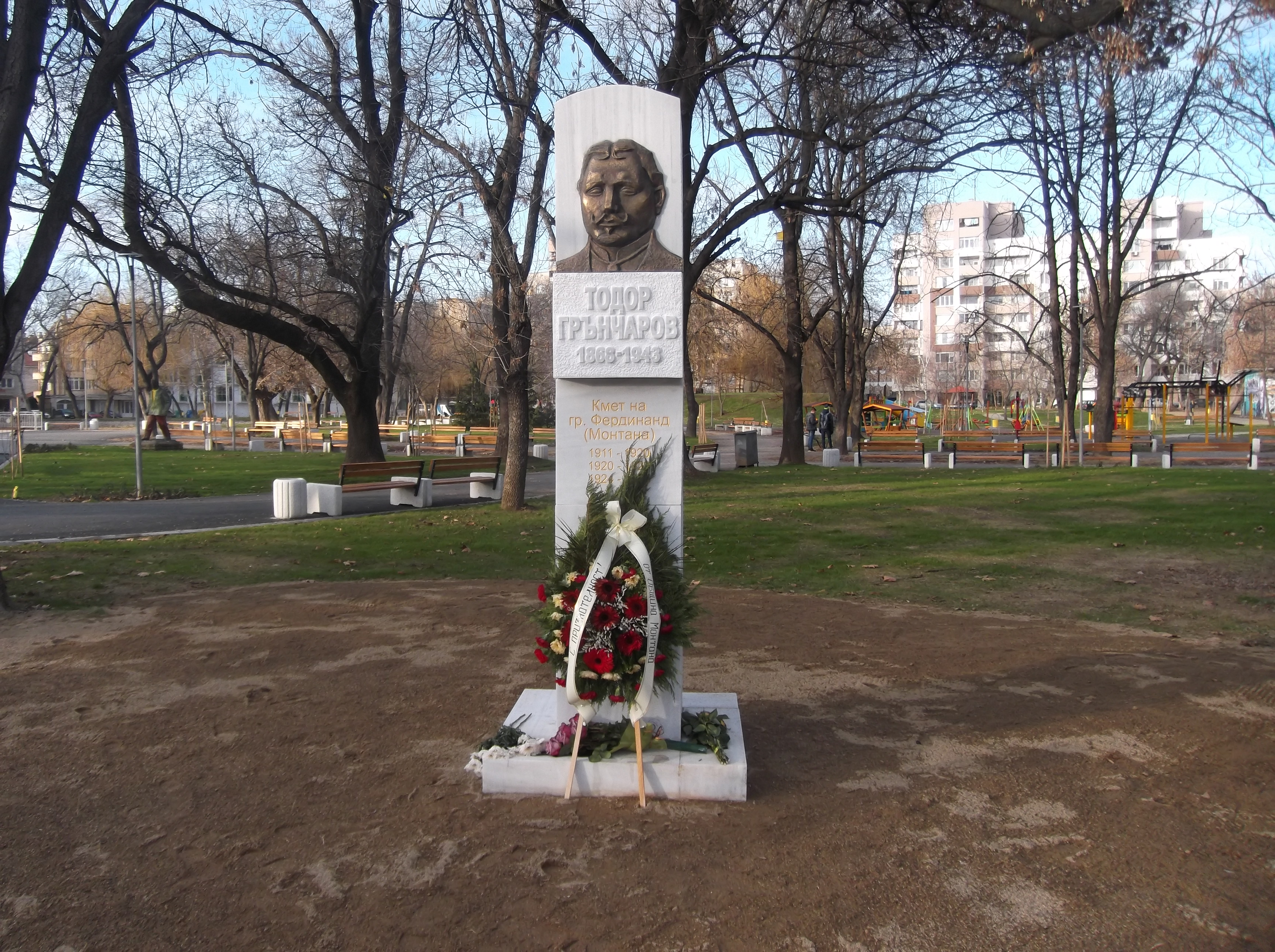 Паметник на кмета Тодор Грънчаров в град Монтана